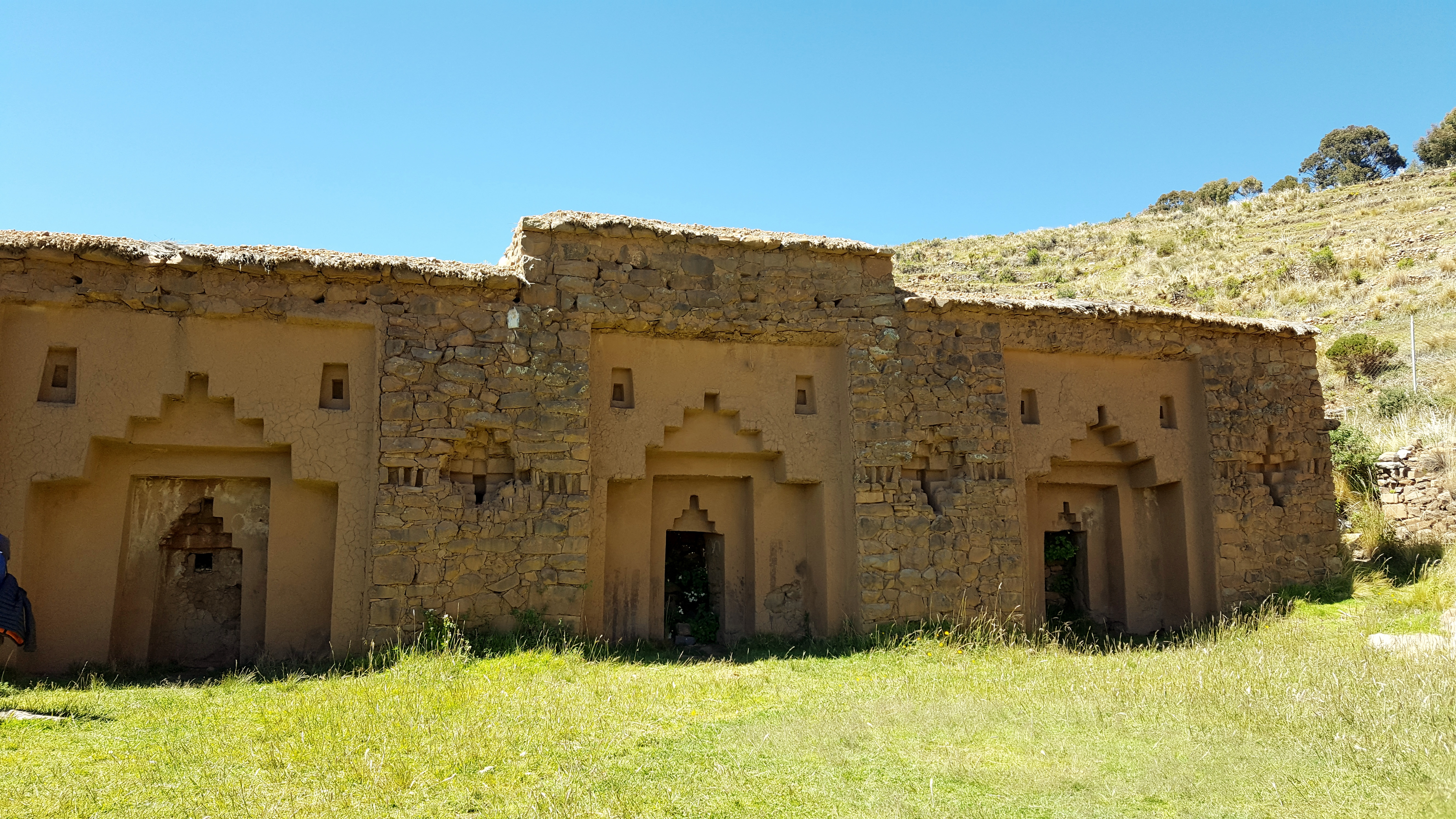 Façade du temple Iñakuyu sur l'Isla de la Luna